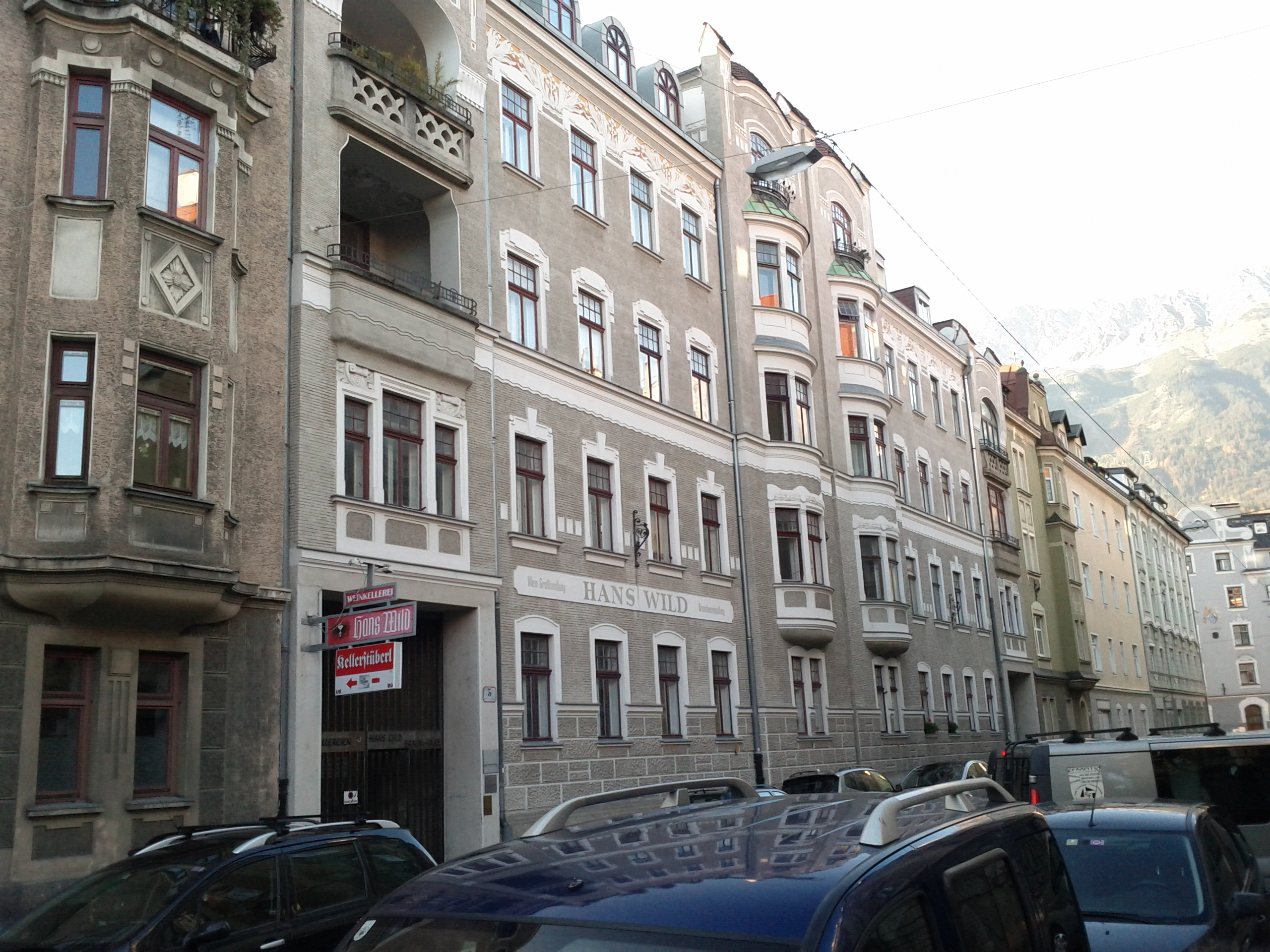 Miethaus Grillparzerstraße 5